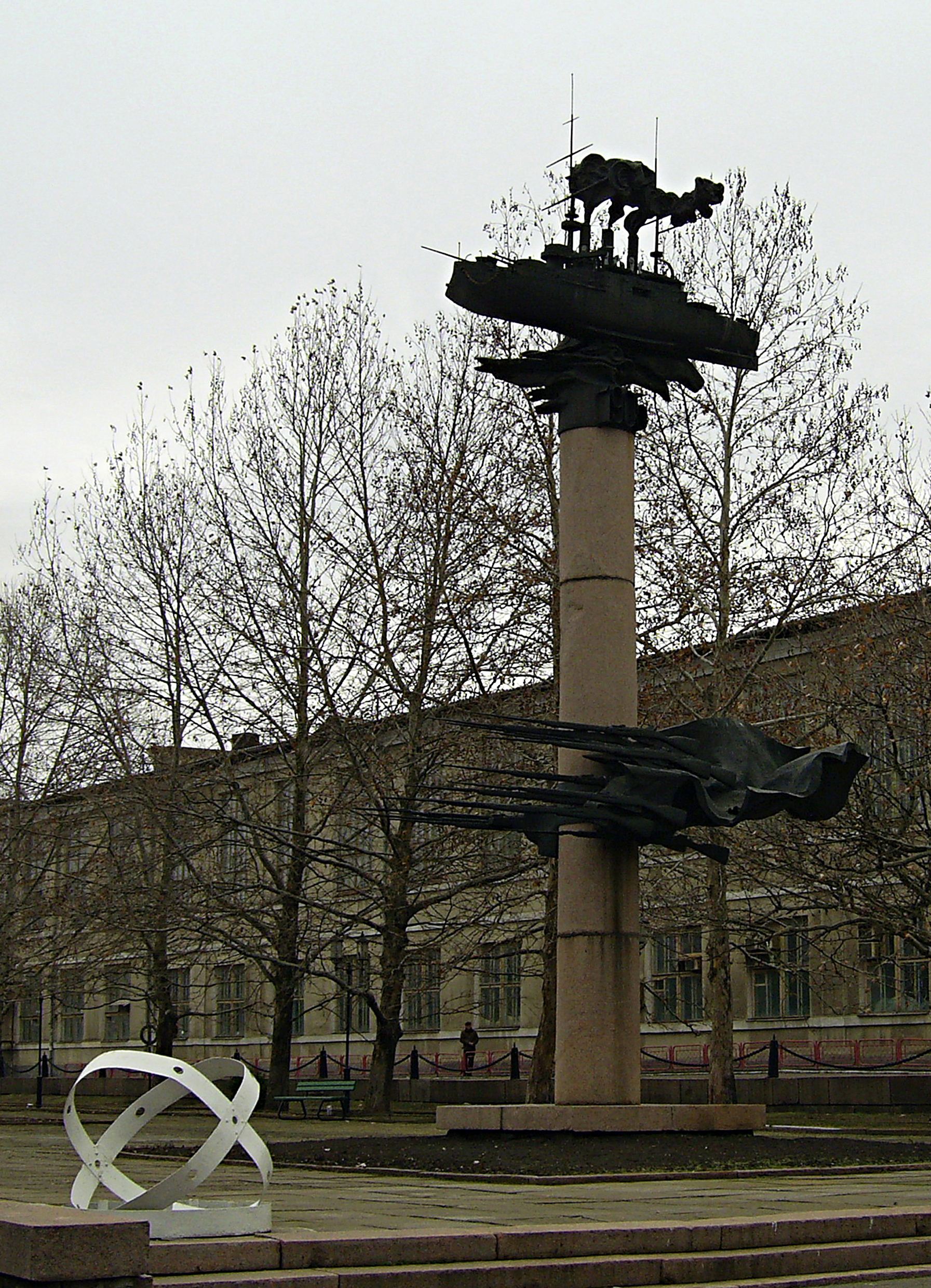 Миколаївська весна у Вікіпедії Дивом уцілілий монумент на честь подвигу броненосця "Потьомкін" ховається від сторонніх очей за високою заводською стіною, тому навіть не всі миколаївці знають, що у місті є такий пам'ятник.